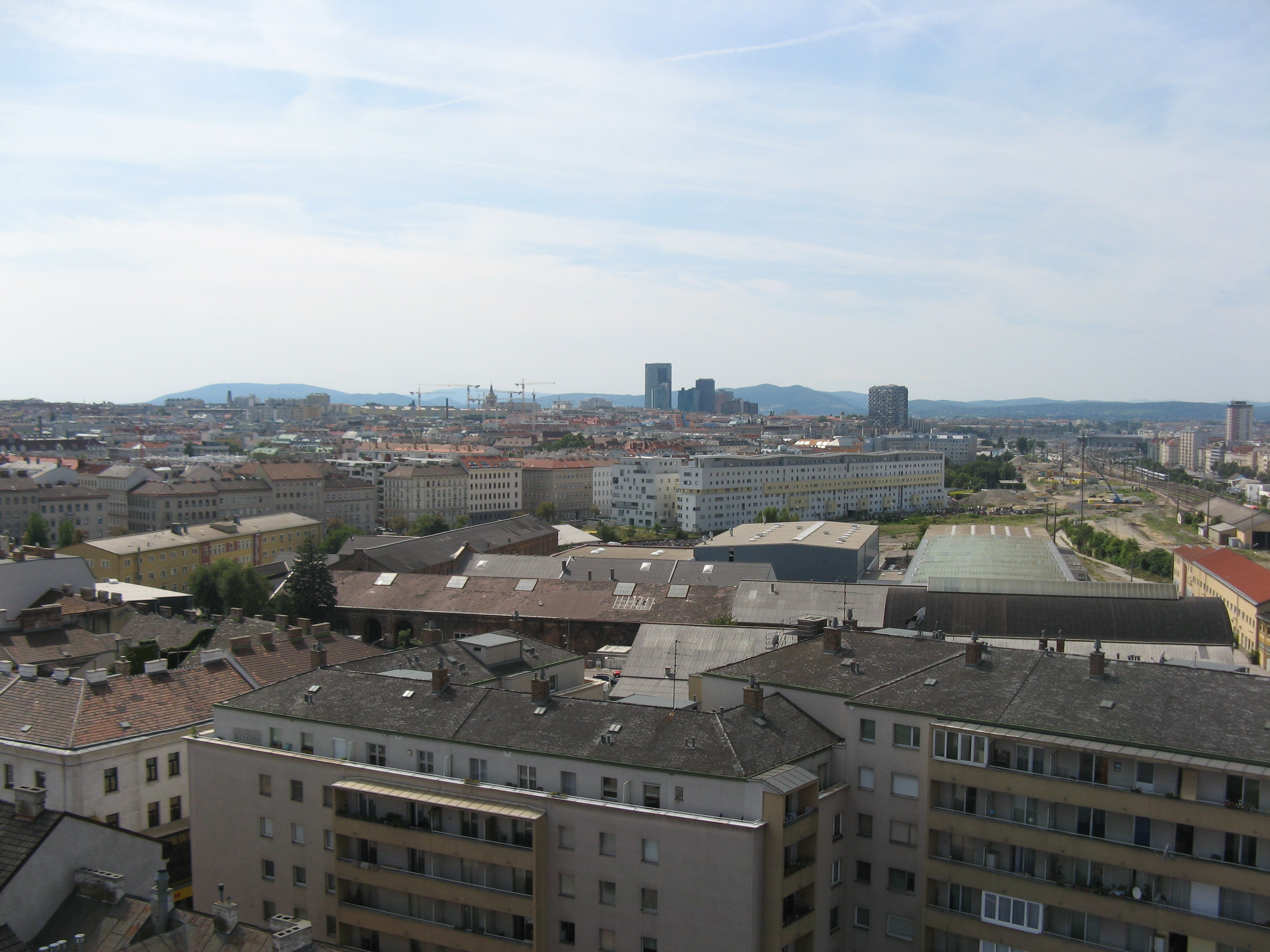 Blick auf Favoriten Richtung Wienerberg vom Bahnorama